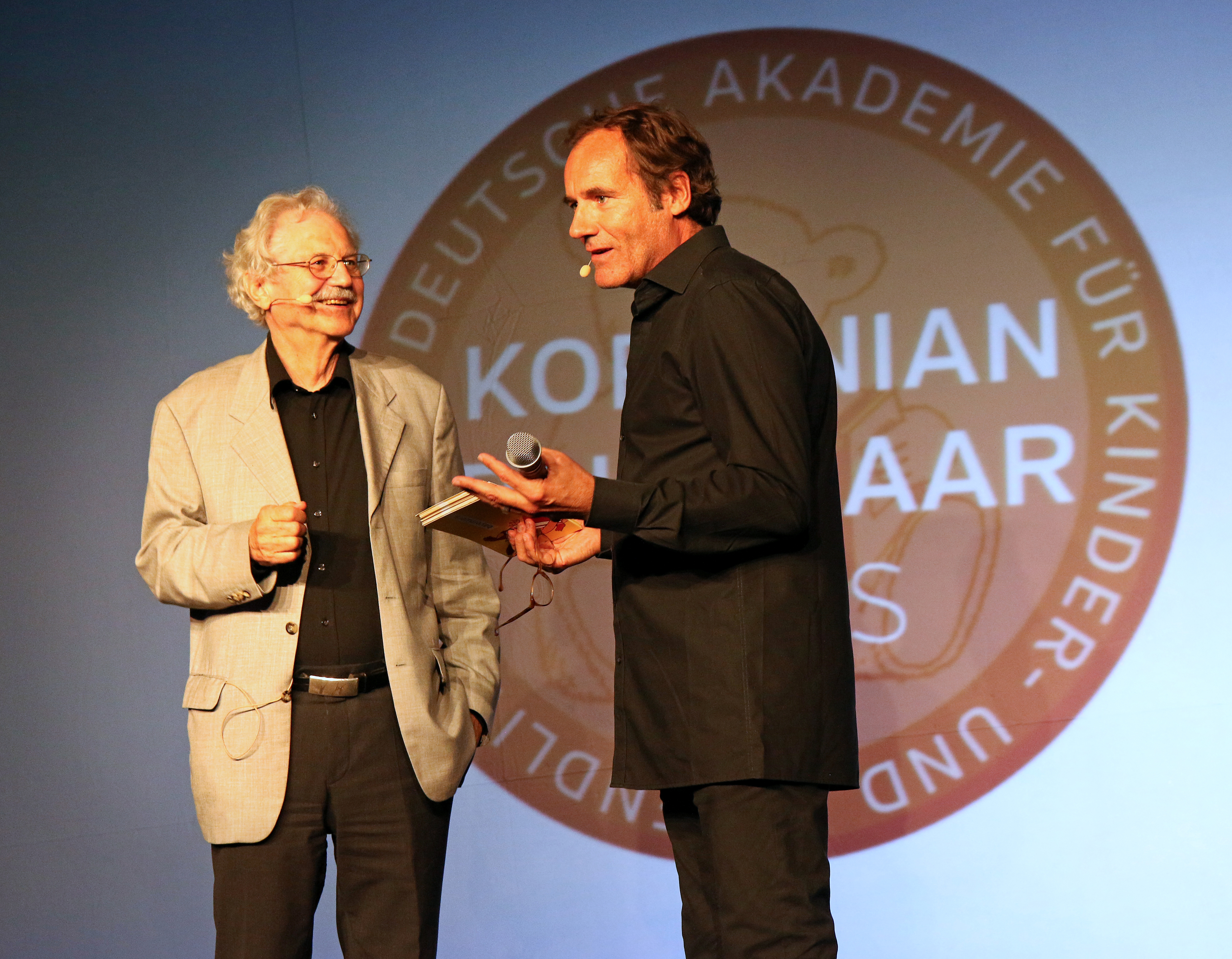 Der Schriftsteller Paul Maar (links) bei der Verleihung des "Korbinian – Paul-Maar-Preises" 2019 der Akademie für Kinder- und Jugenliteratur . Rechts der Moderator Thomas Ohrner.